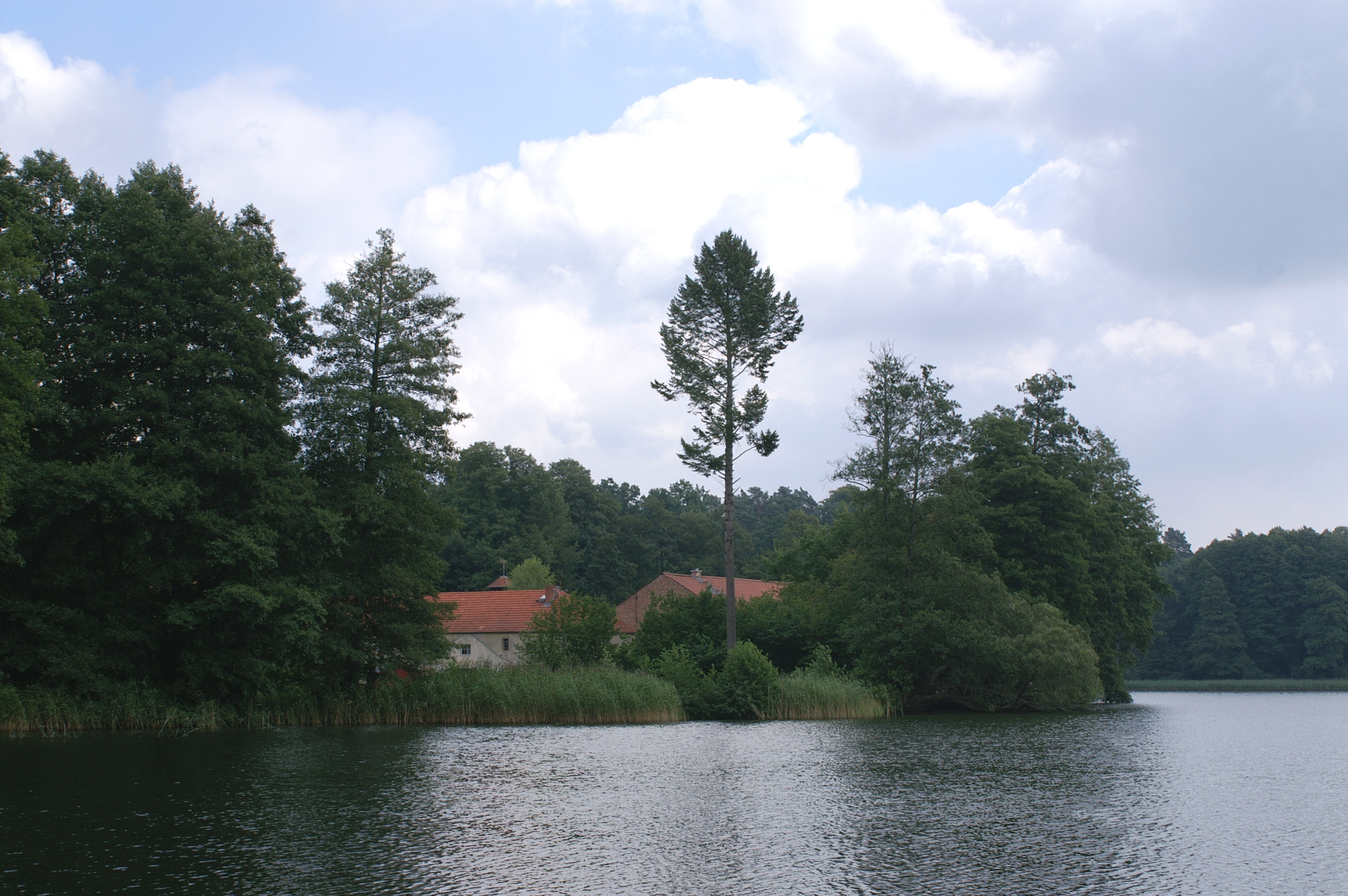 Hellsee, Hofgebäude der Hellmühle